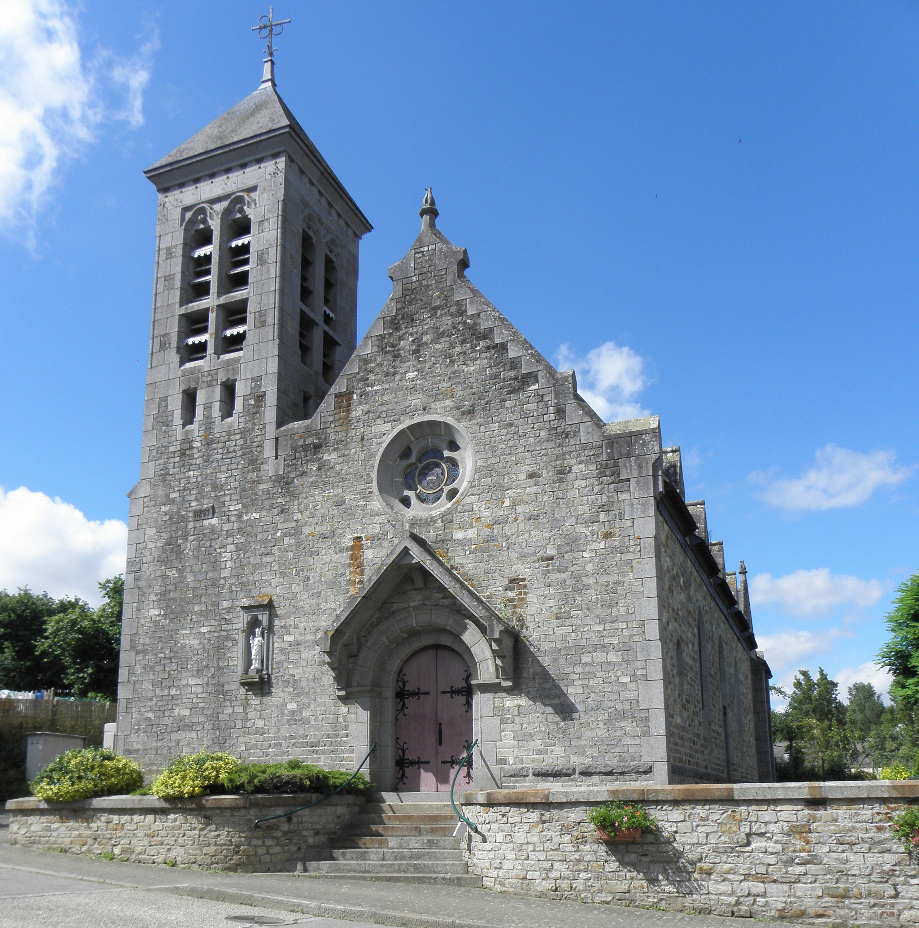 Église saint-Melaine de Mouazé (35).